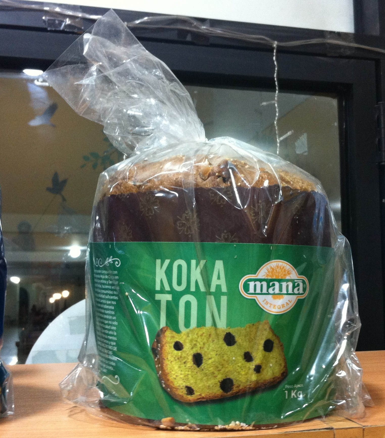 Kokaton, panettone elaborado con harina de coca en Perú.